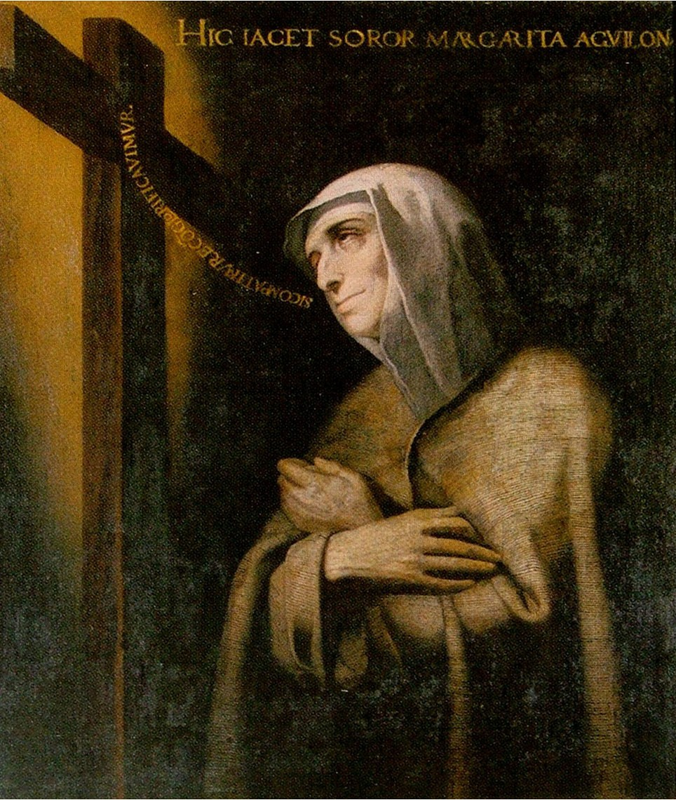 Retrato de la religiosa española Margarita Agullona (1536-1600), que perteneció a la Tercera Orden de San Francisco y fue conocida también como Margarita Agulló, Sor Agullona o Beata Agullona.